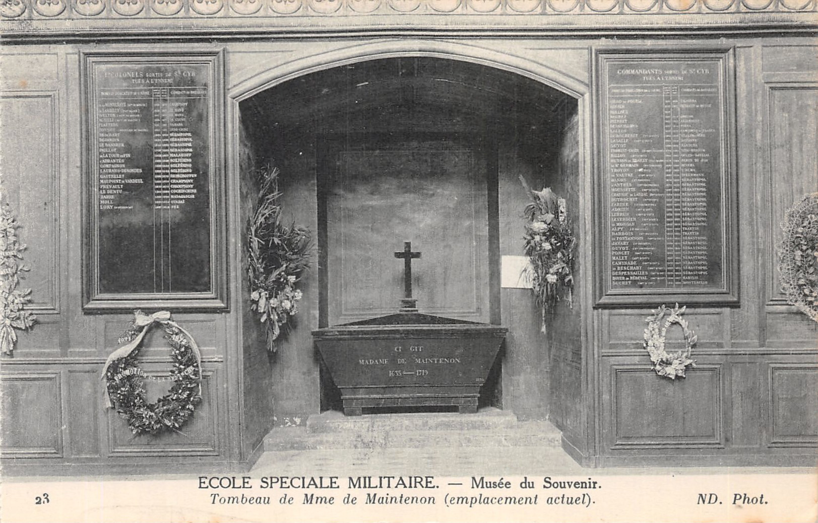 Tombeau de Madame de Maintenon à Saint-Cyr entre 1836 et 1944